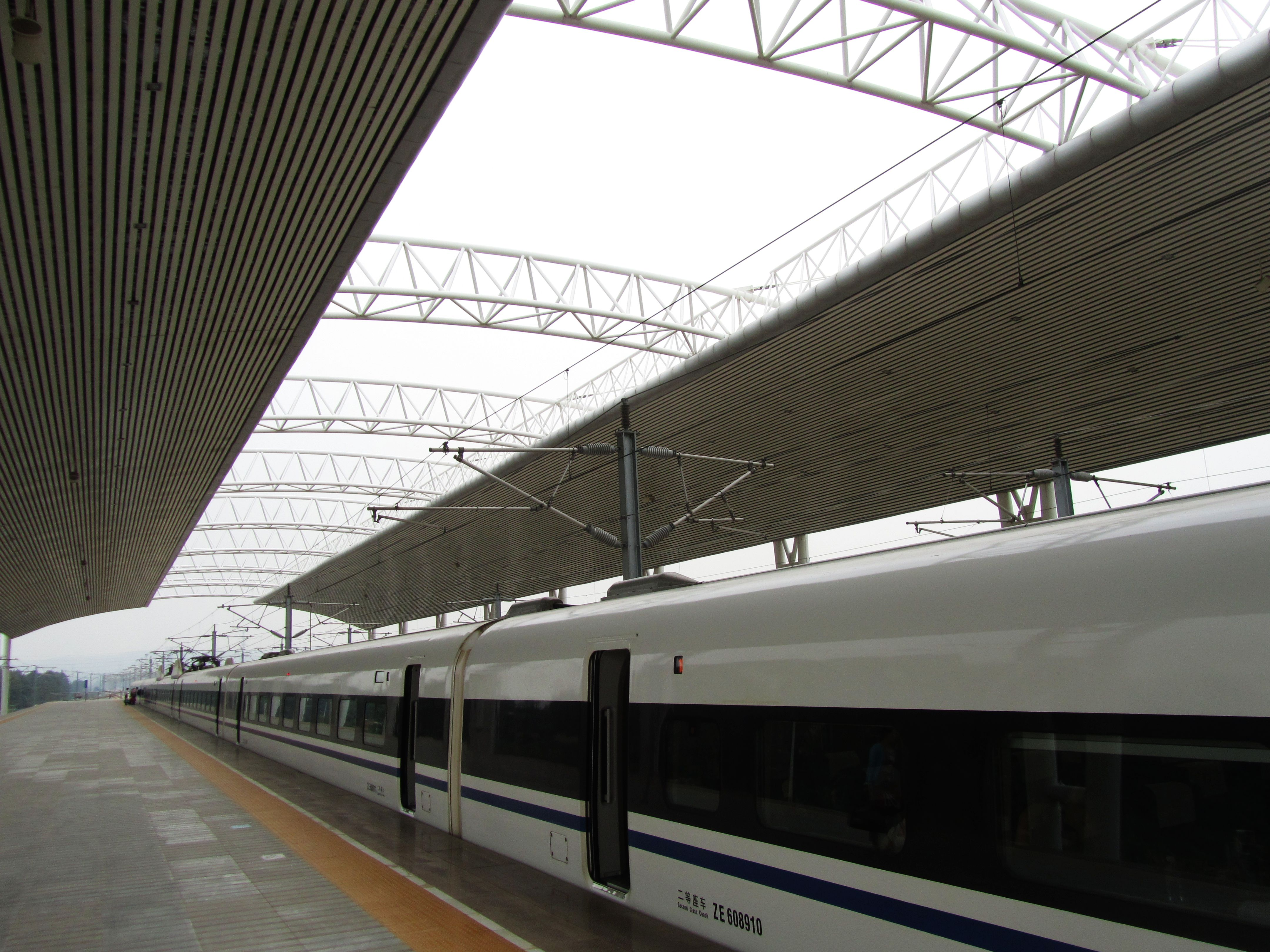 渭南北站站台，东侧。